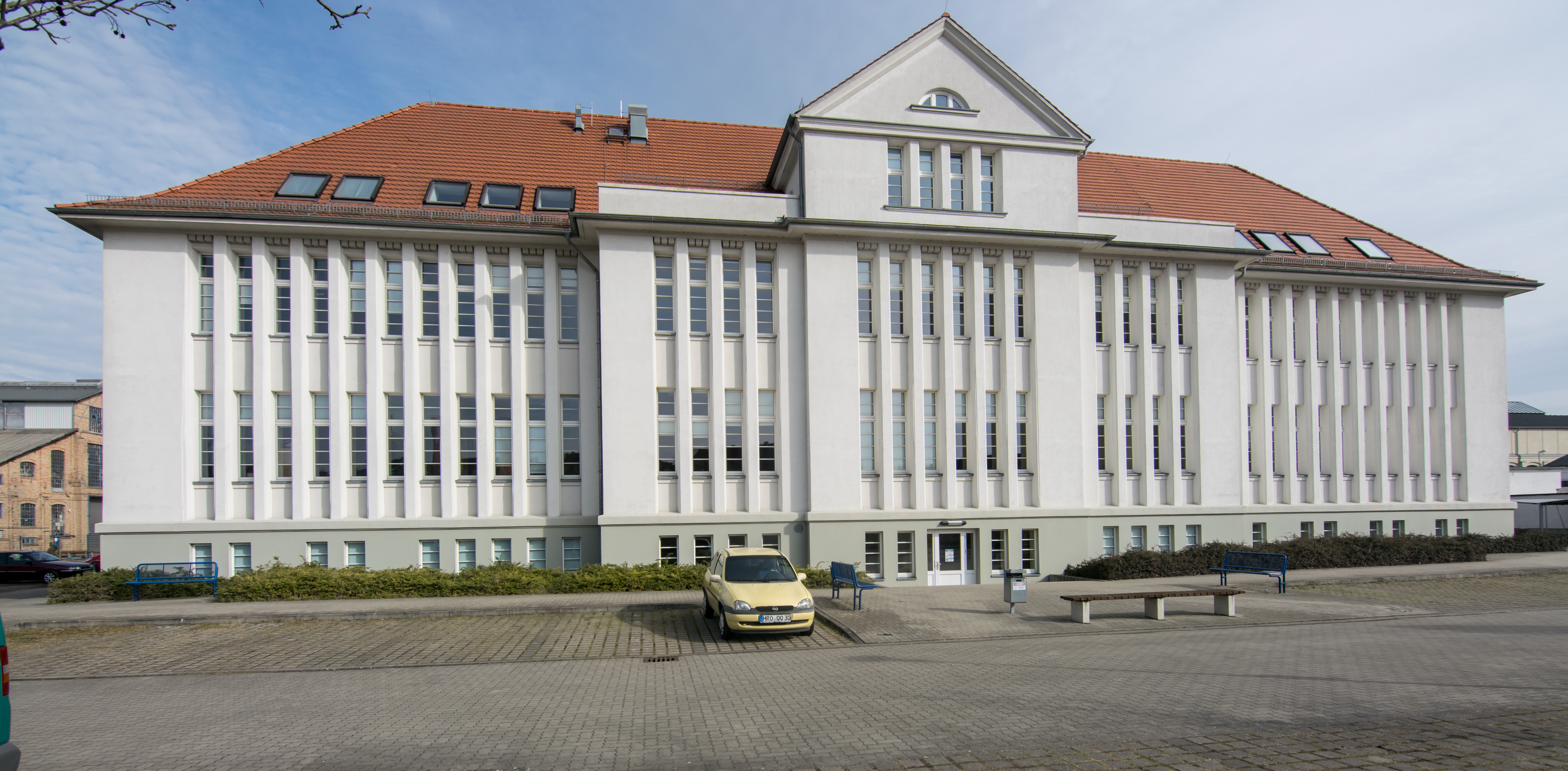 Europäische Hochschule Rostock, Werftstrasse 5 von Südwesten